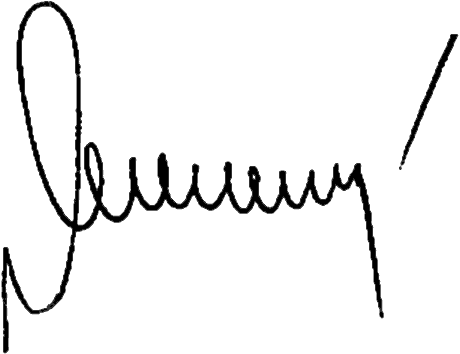 Роспись народного депутата Украины Геннадия Москаля